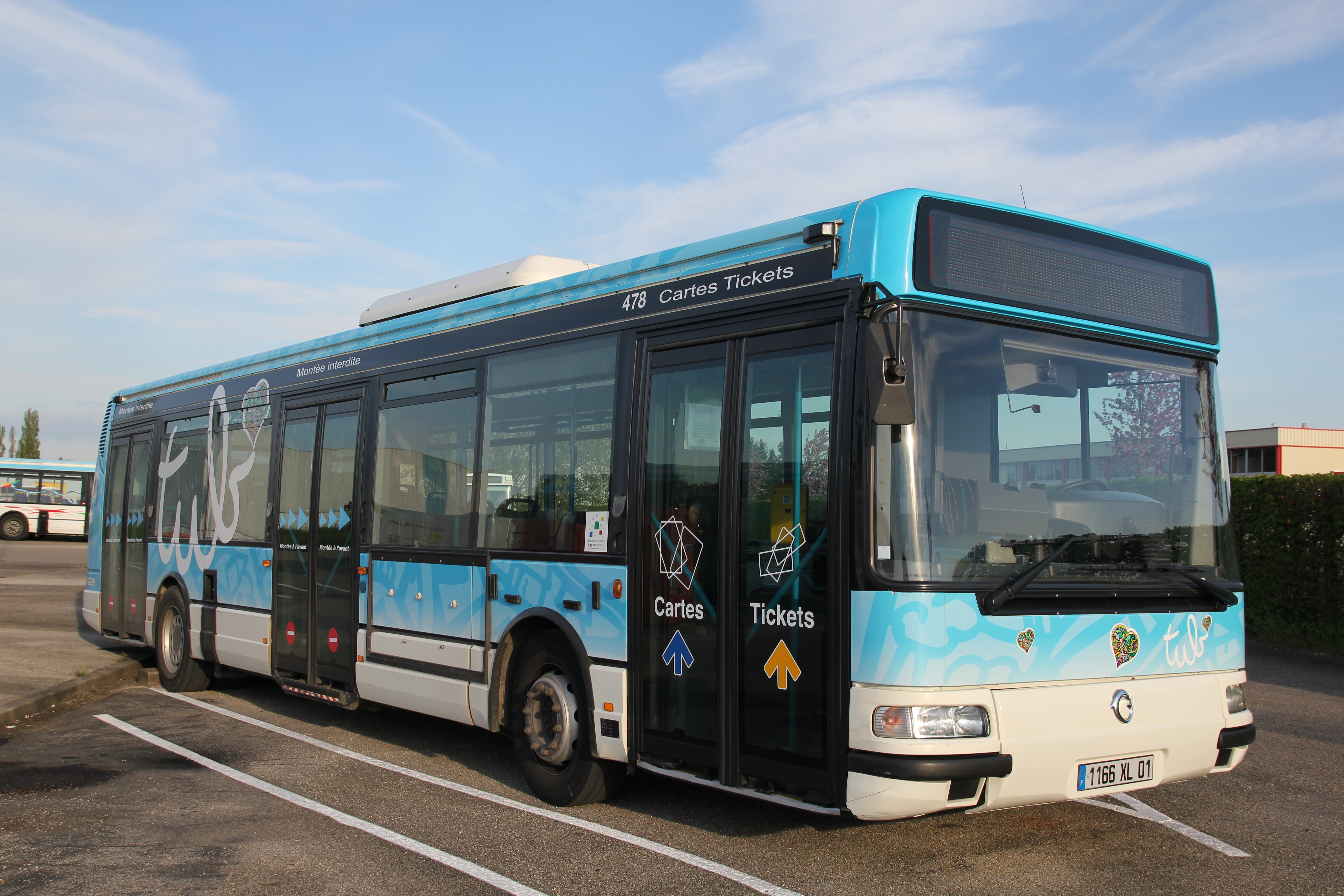 Bus standard Irisbus Agora S n°478 du réseau urbain de Bourg-en-Bresse Agglomération